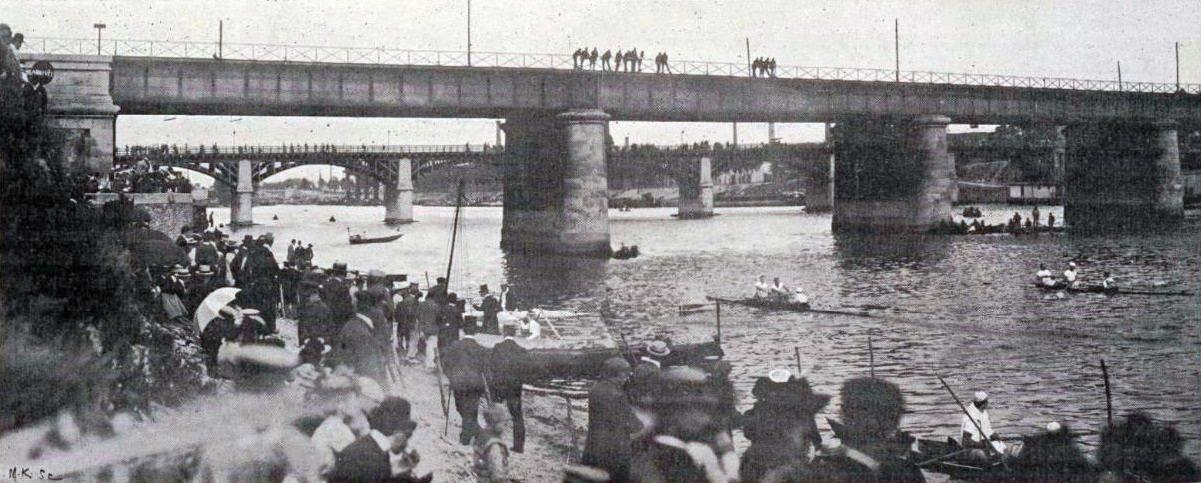 L'aviron aux JO de 1900 (régates avec arrivée au pont d'Asnières sur la Seine).